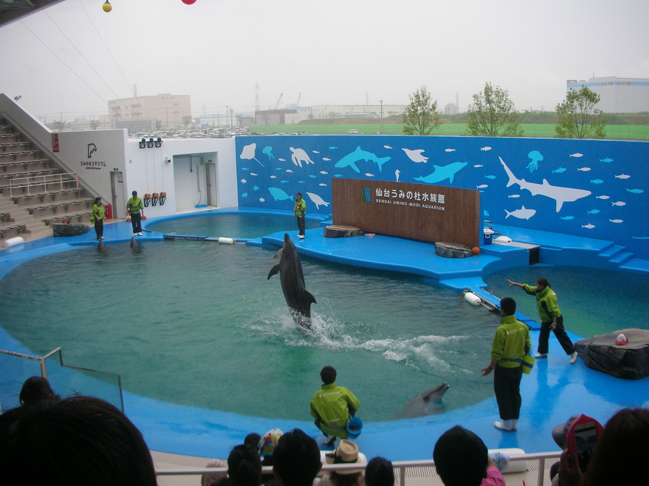 うみの森水族館・イルカショー